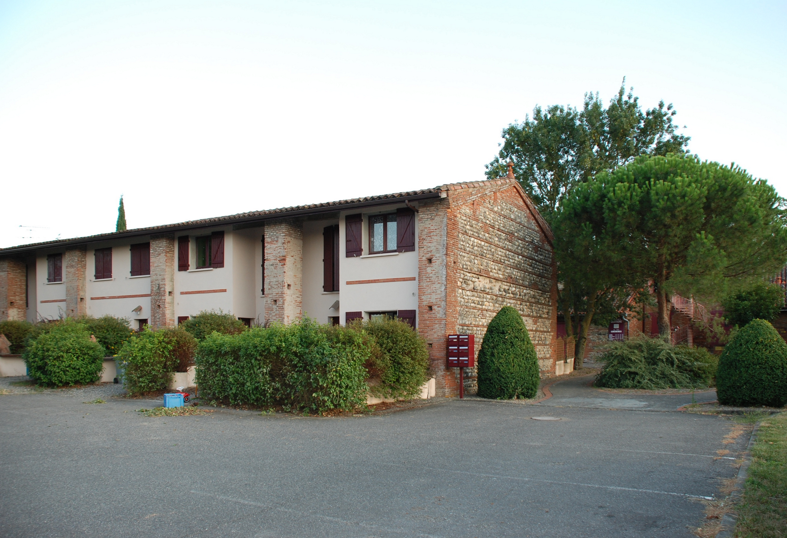 Vigoulet-Auzil (Haute-Garonne, France) : Habitat collectif conçu dans un ancien bâtiment agricole traditionnel du Lauragais (avec briques et galets).